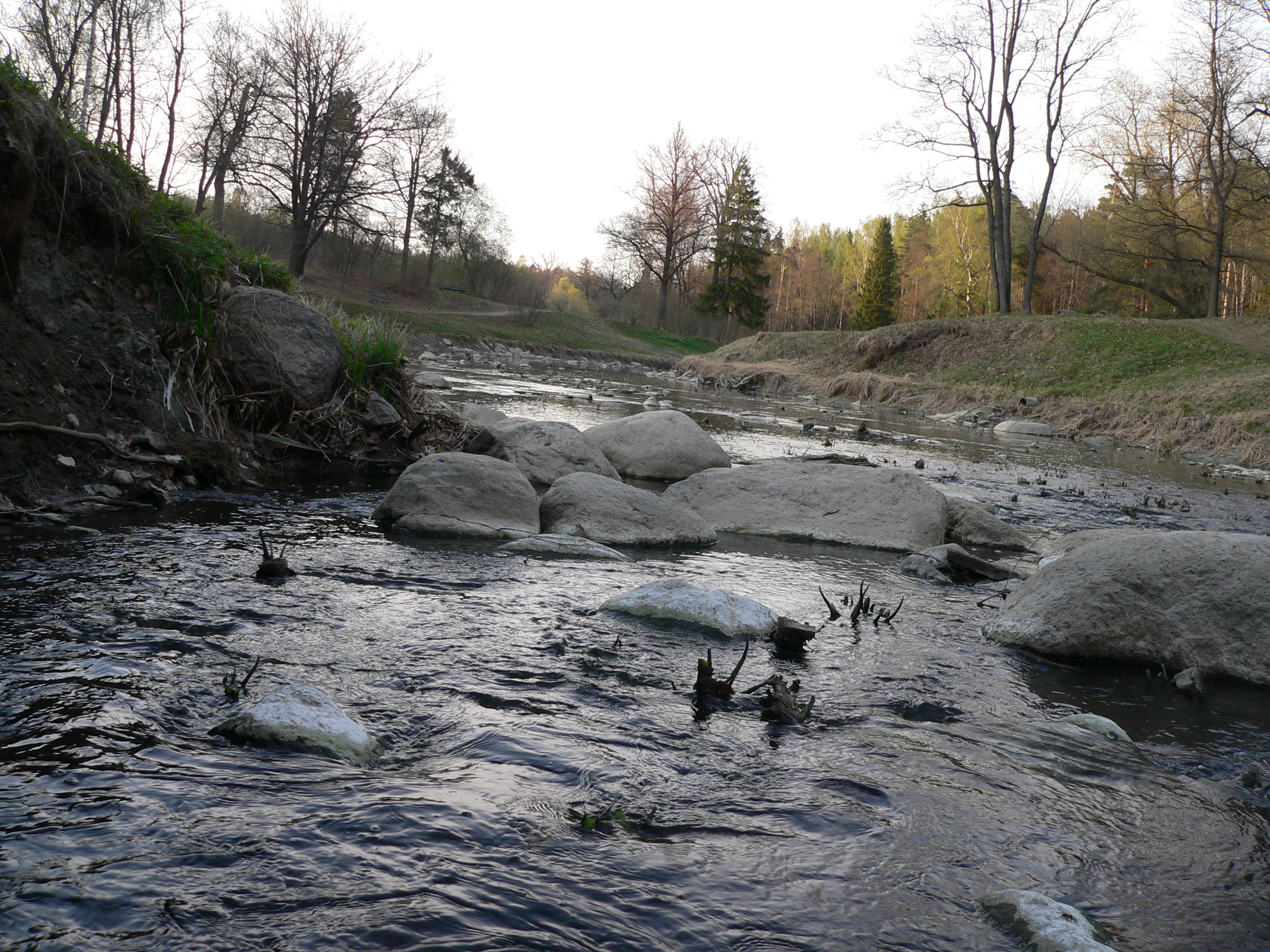 Славянка весной.